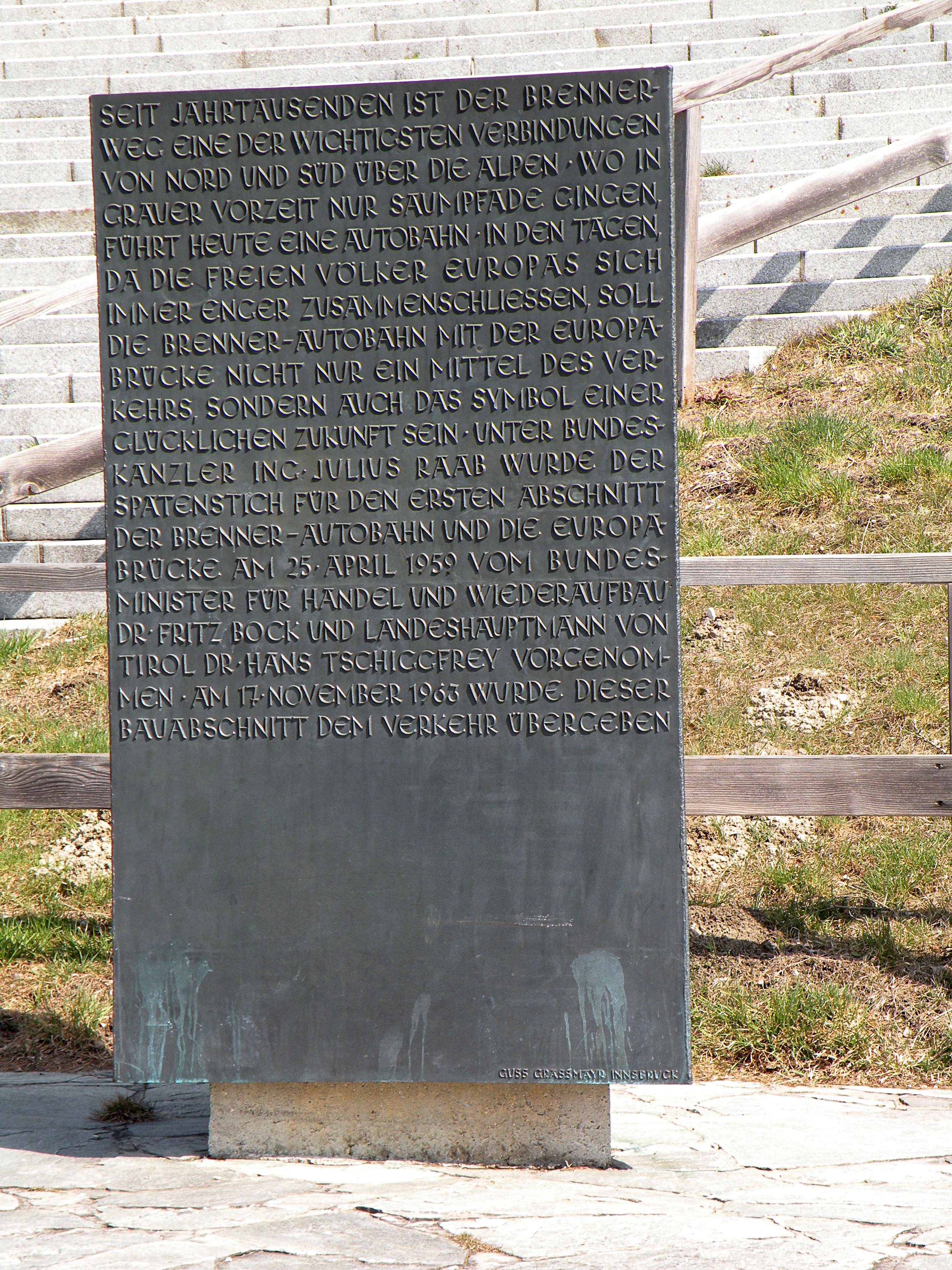 Мемориал строителям Евромоста This media shows the remarkable cultural object in the Austrian state of Tyrol listed by the Tyrolean Art Cadastre with the ID 41742. (on tirisMaps, on tirisdienste.at, pdf, more images on Commons)